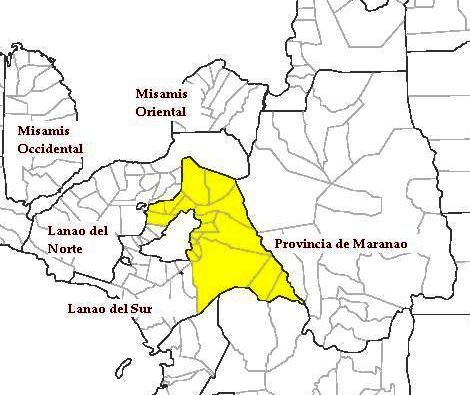 La fallida provincia de Maranao (Province of Maranaw) año 1971.